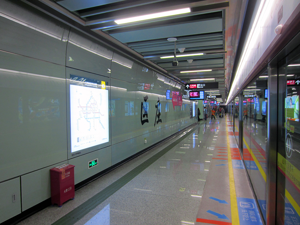 區莊站6號線月台